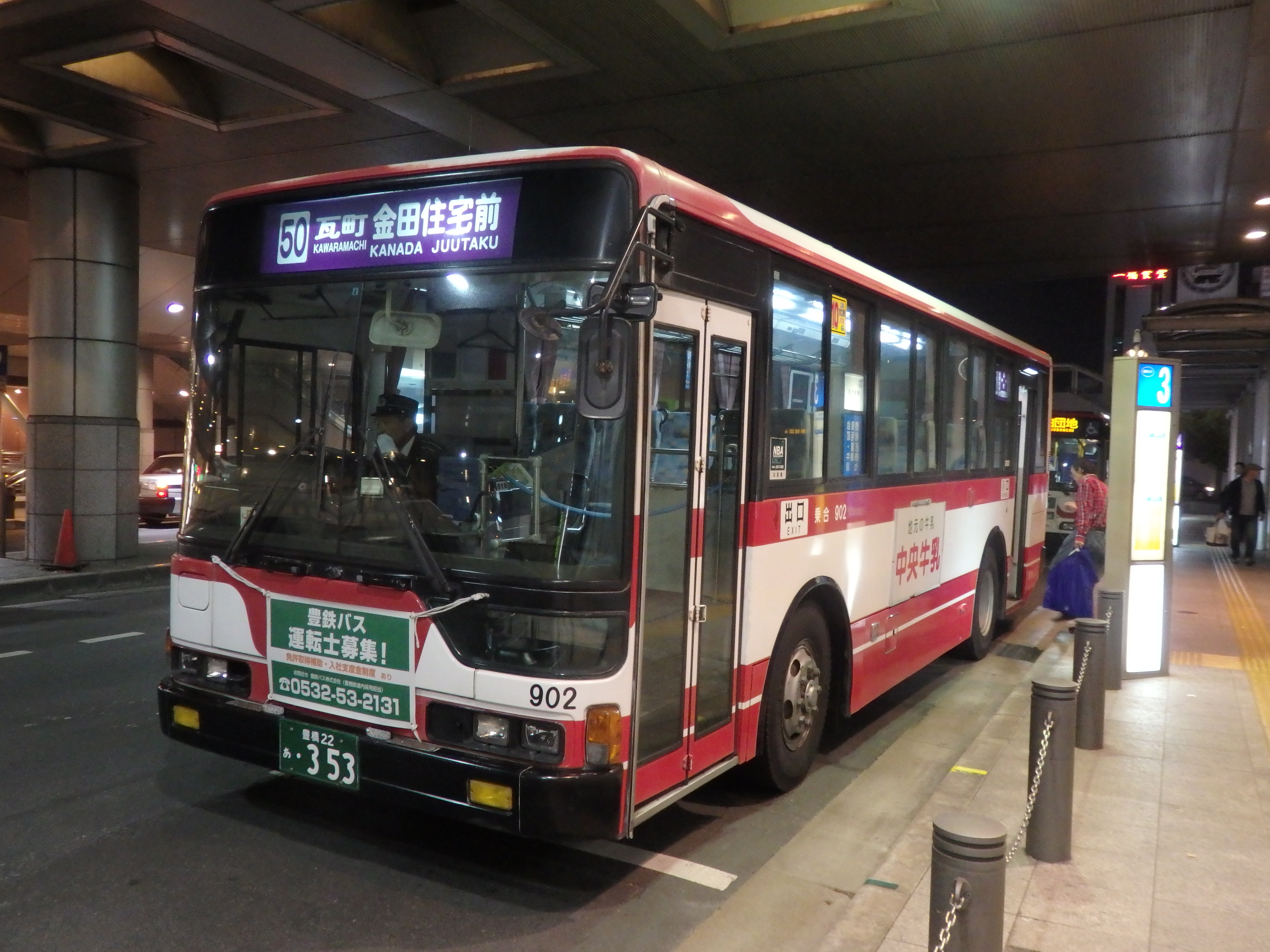 豊鉄バス豊橋営業所所管牛川金田線